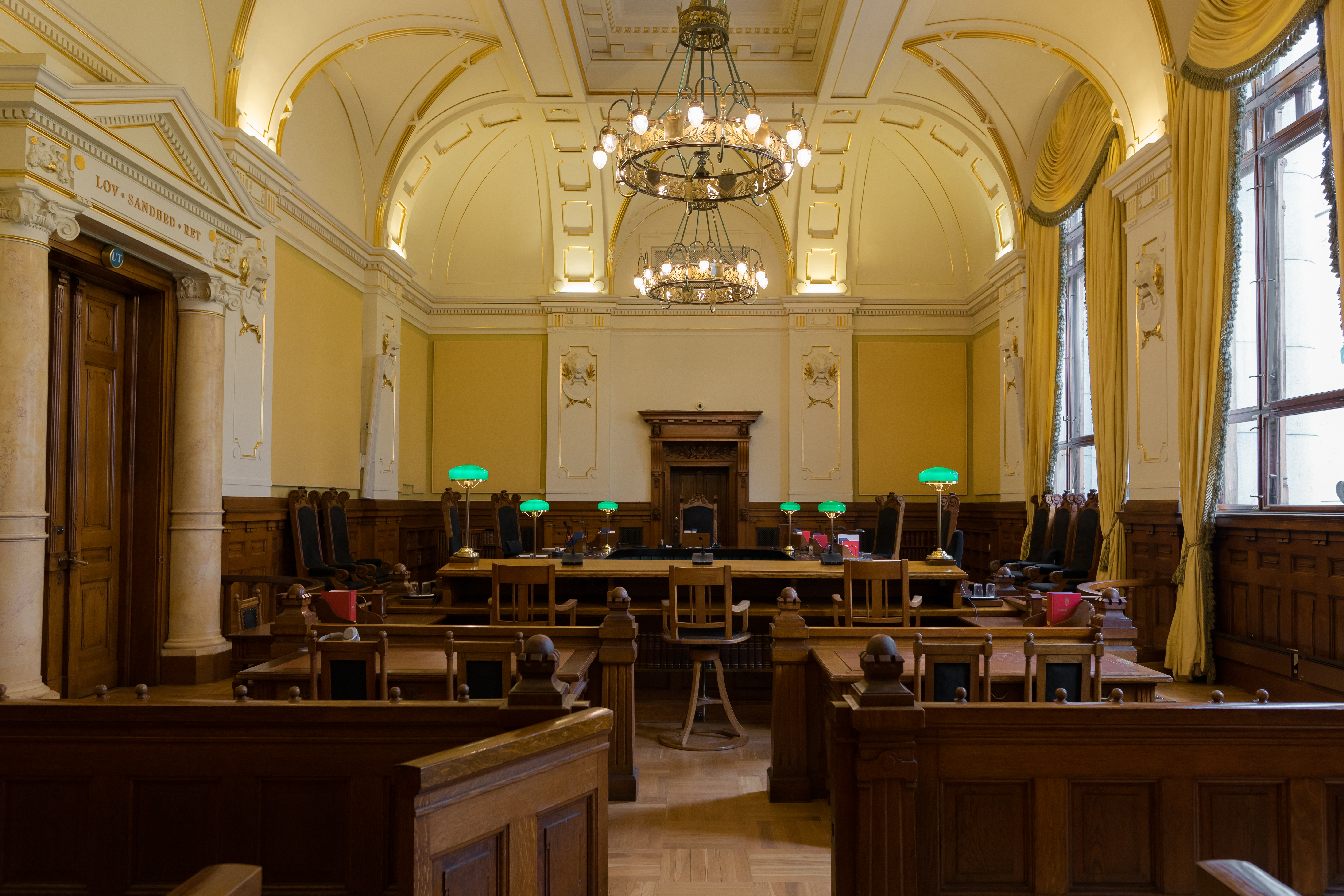 Rettssal andre avdeling Norges Høyesterett.